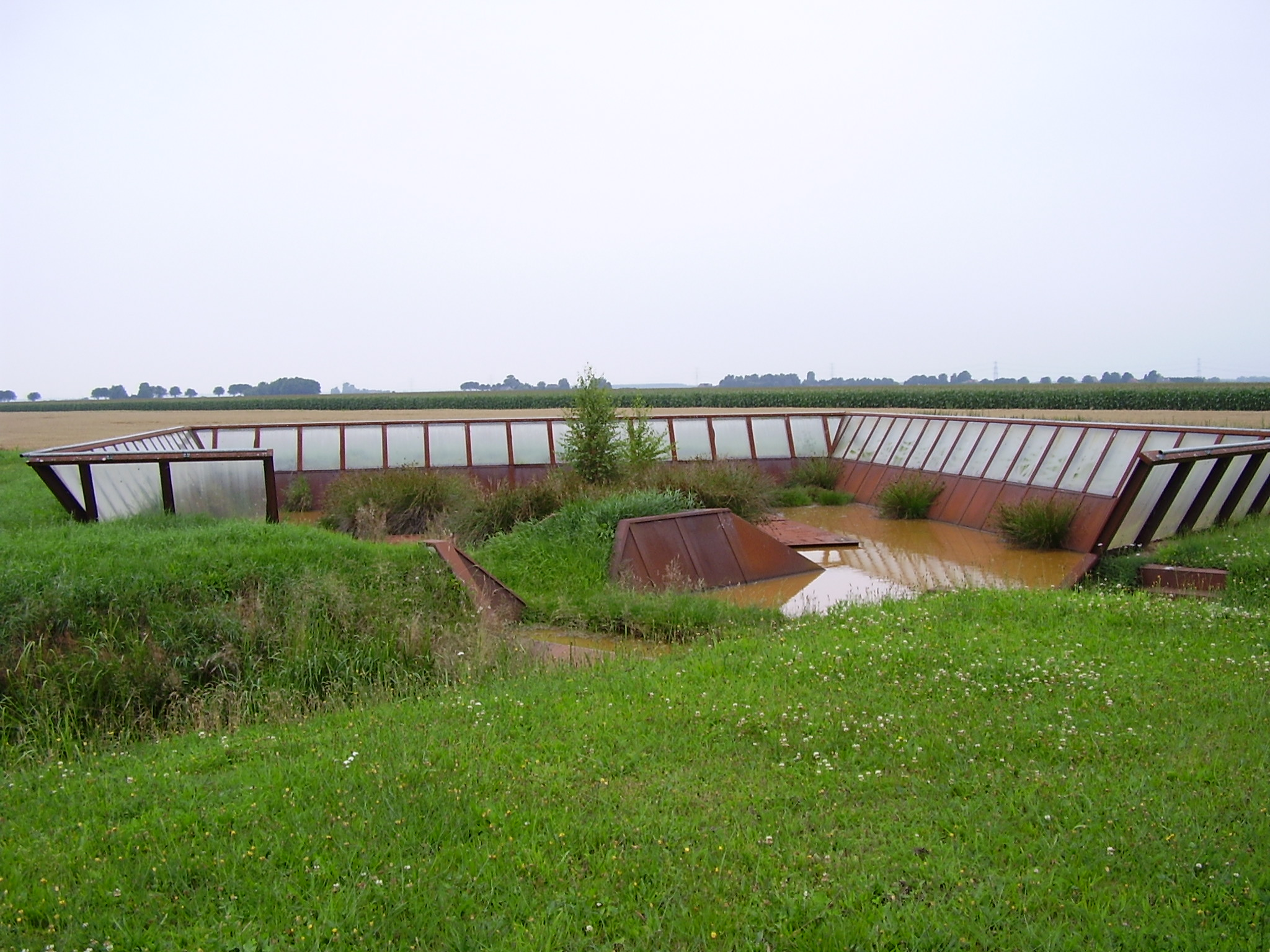 Fort voor het water bij Roswinkel. Kunstwerk gemaakt door Jeroen van Westen, foto gemaakt door Marco Roepers. Toestemming van Jeroenvan Westen om foto van dit kunstwerk van zijn hand op wikipedia te mogen plaatsen. Zie daarvoor de kluis. Foto als zodanig gedoneerd aan wikipedia binnen de wikipedia geldende licentie Categorie:Afbeelding Emmen